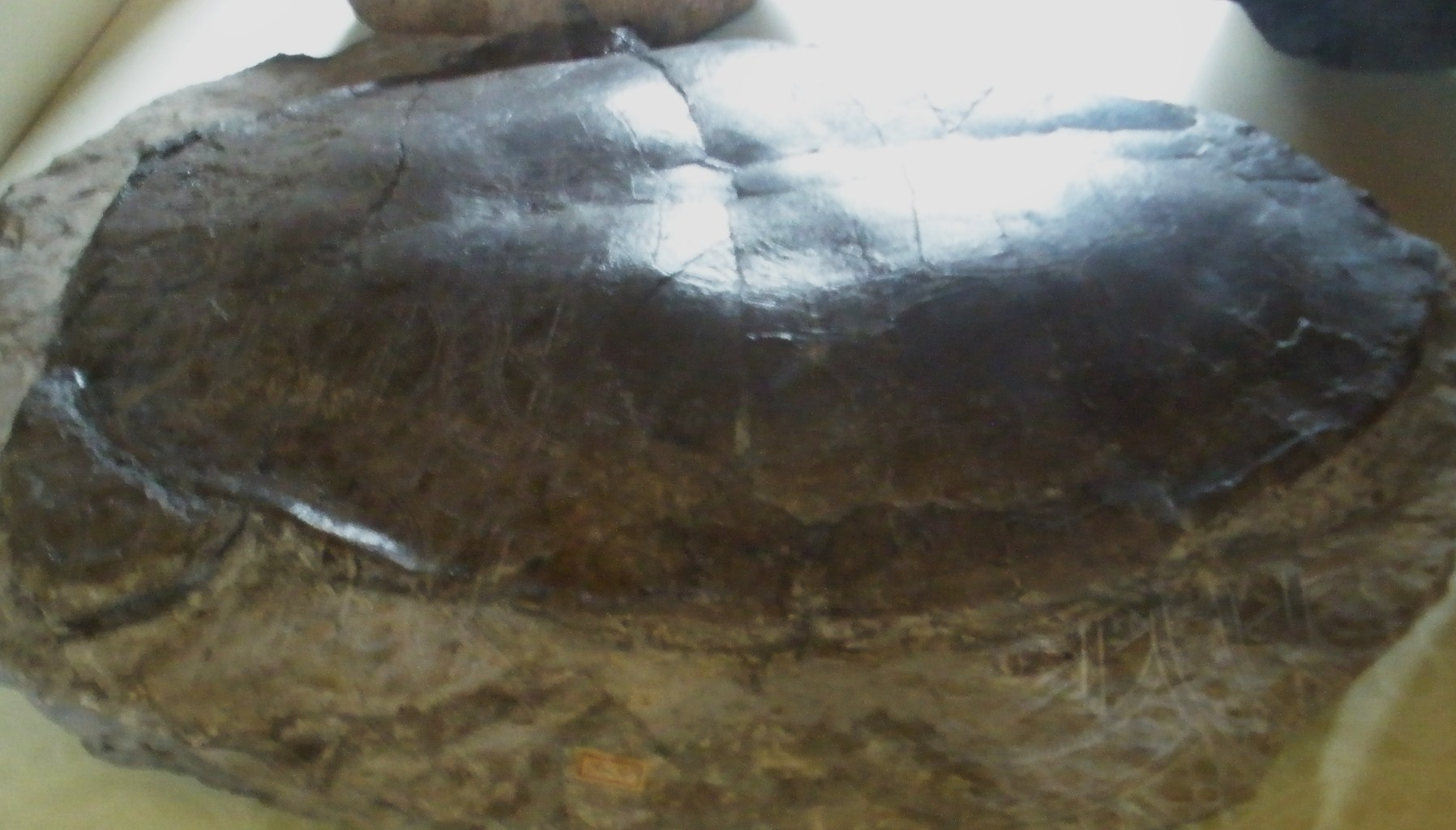 Fossil of Pleurosternon, an extinct turtle- Took the photo at Teylers Museum, Haarlem